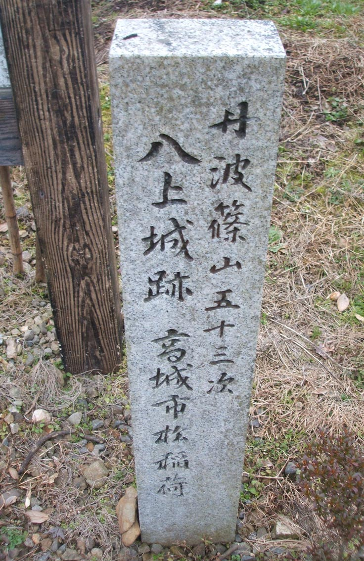 八上城石碑